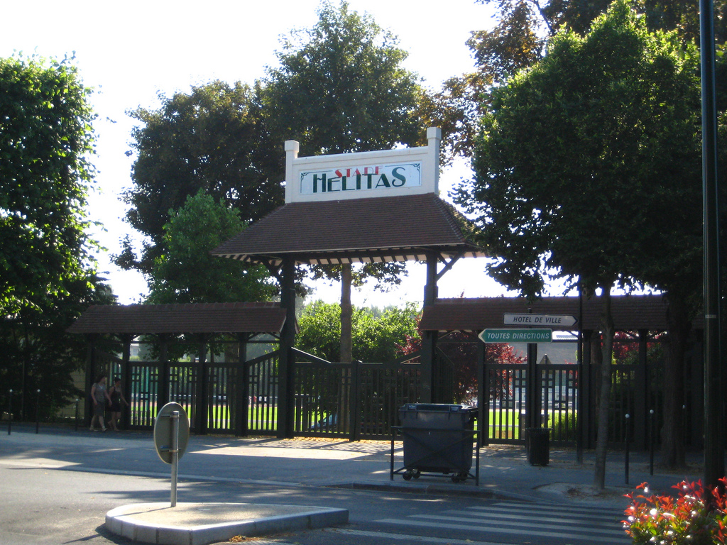 Portail du stade Hélitas à Caen